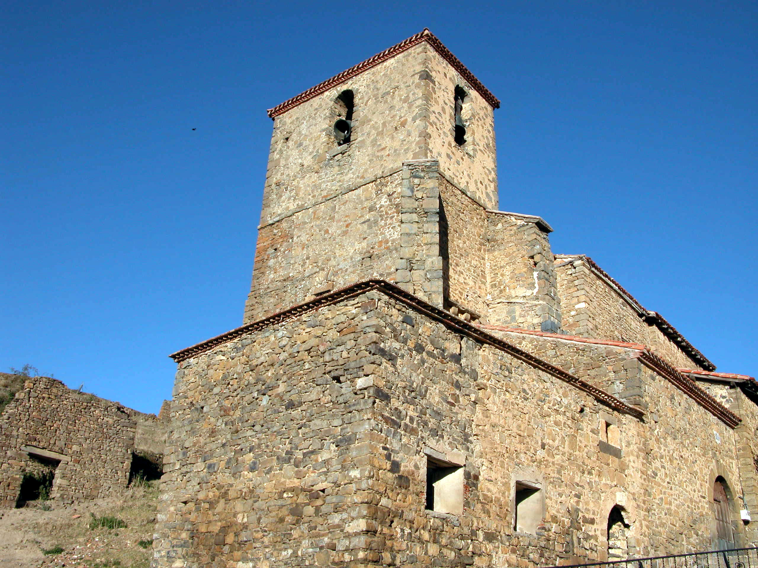 Iglesia de Nuestra Señora de la Asunción en Hornillos de Cameros, La Rioja - España.